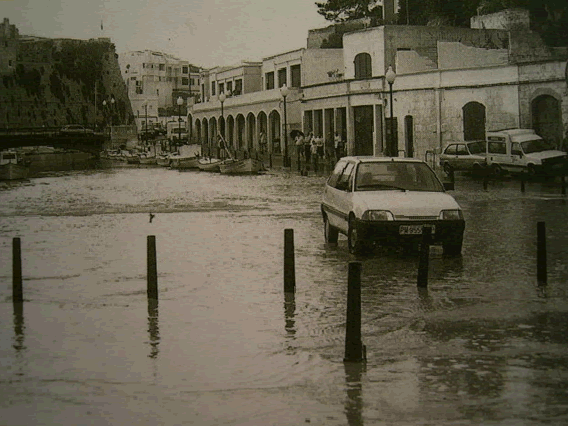 Rissaga